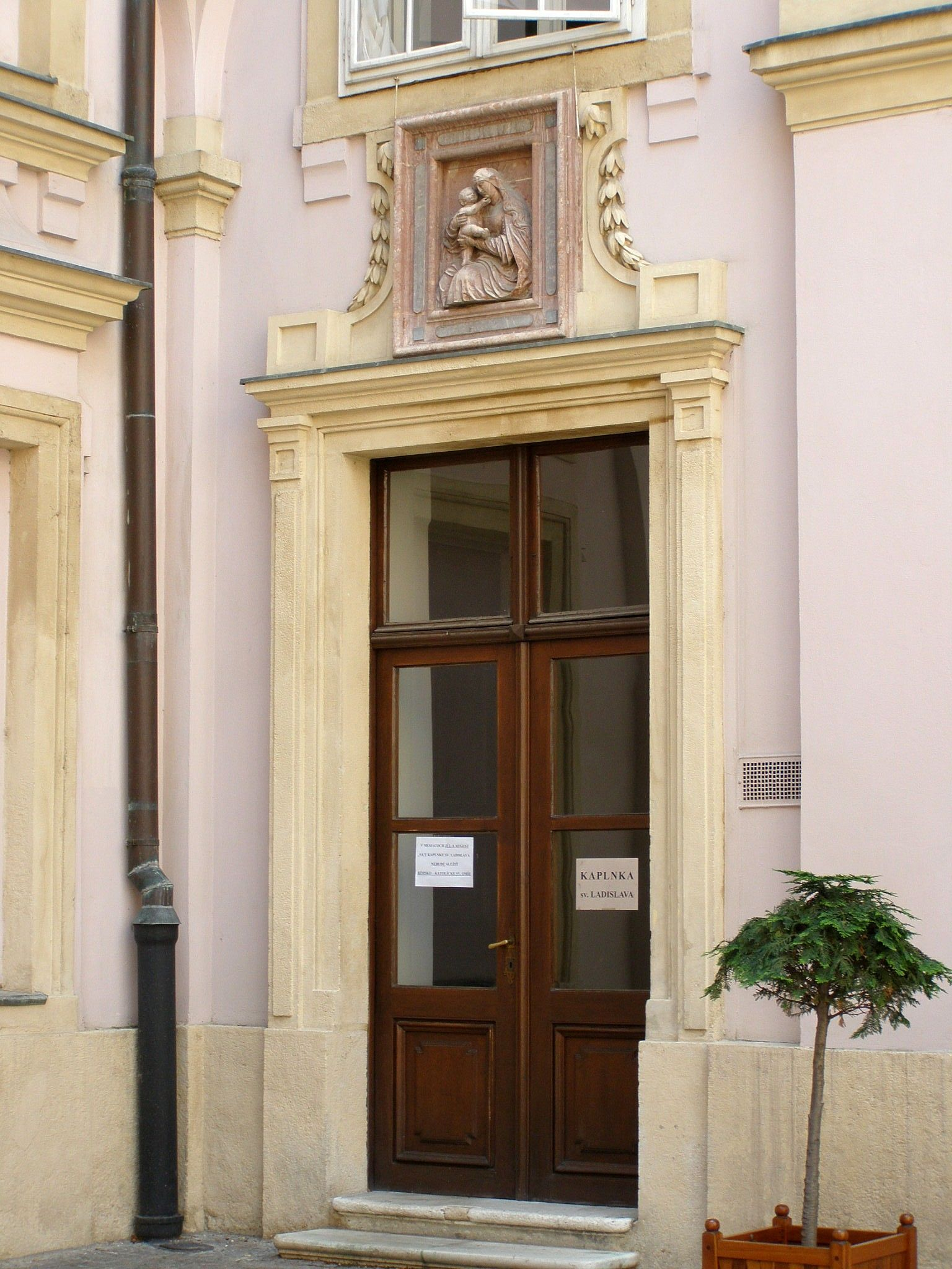 Vstup do kaplnky sv. Ladislava